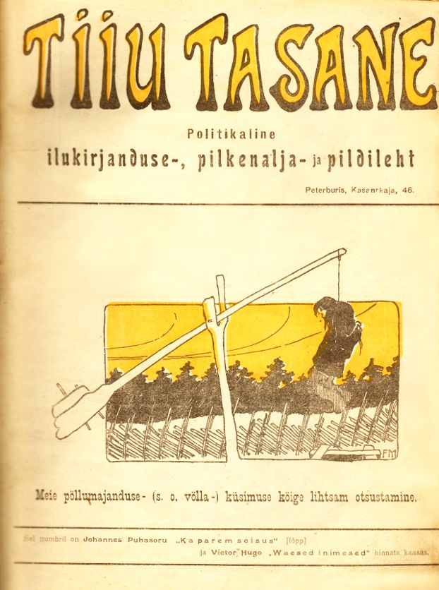 Tiiu Tasane, esikaas